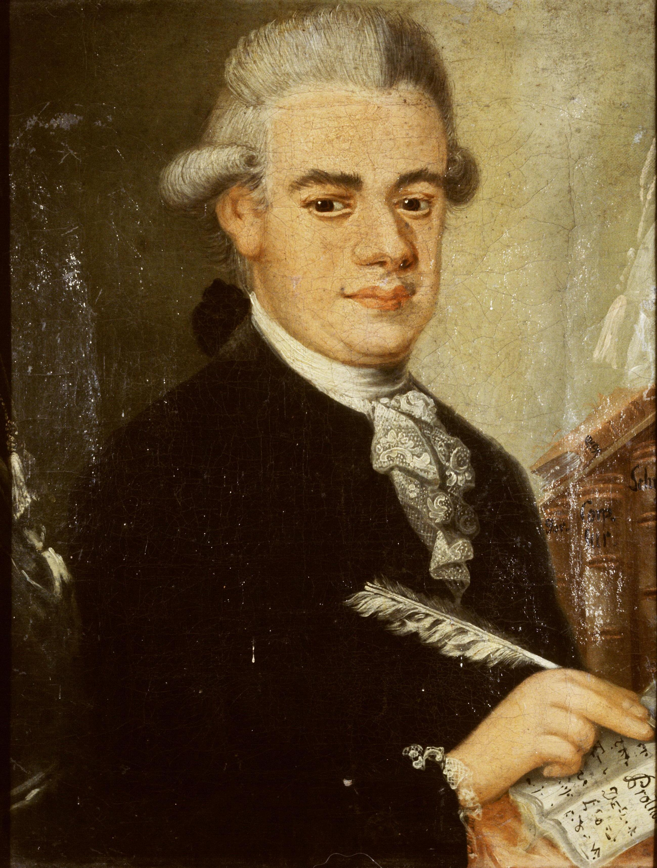 portret van Herman Hendrik Vitringa (1757-1801)